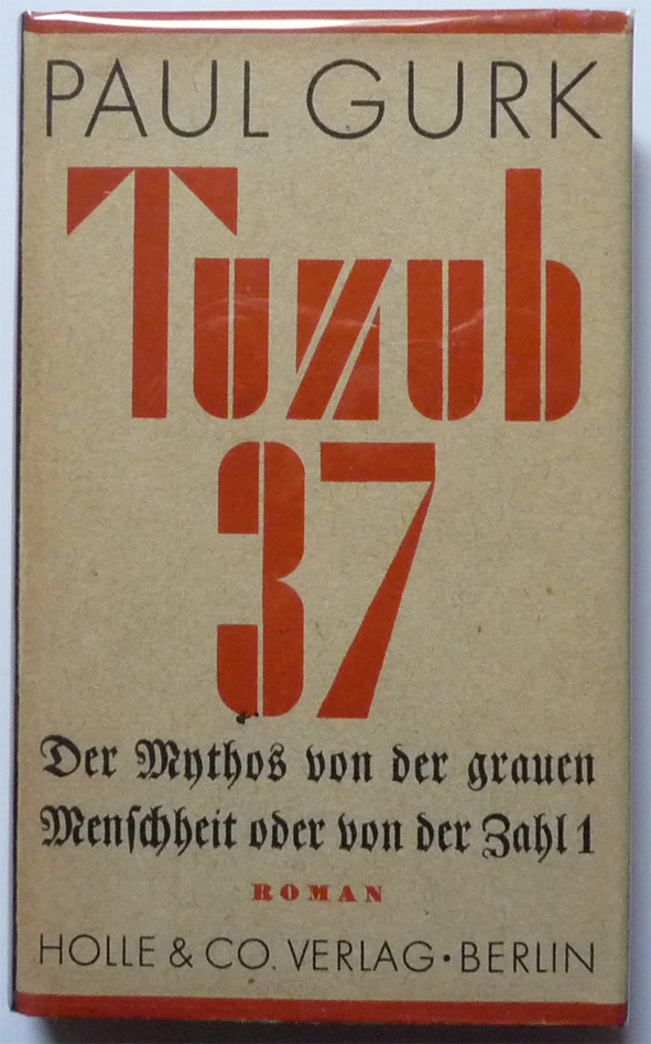 Originalausgabe, Holle & Co., Berlin 1935